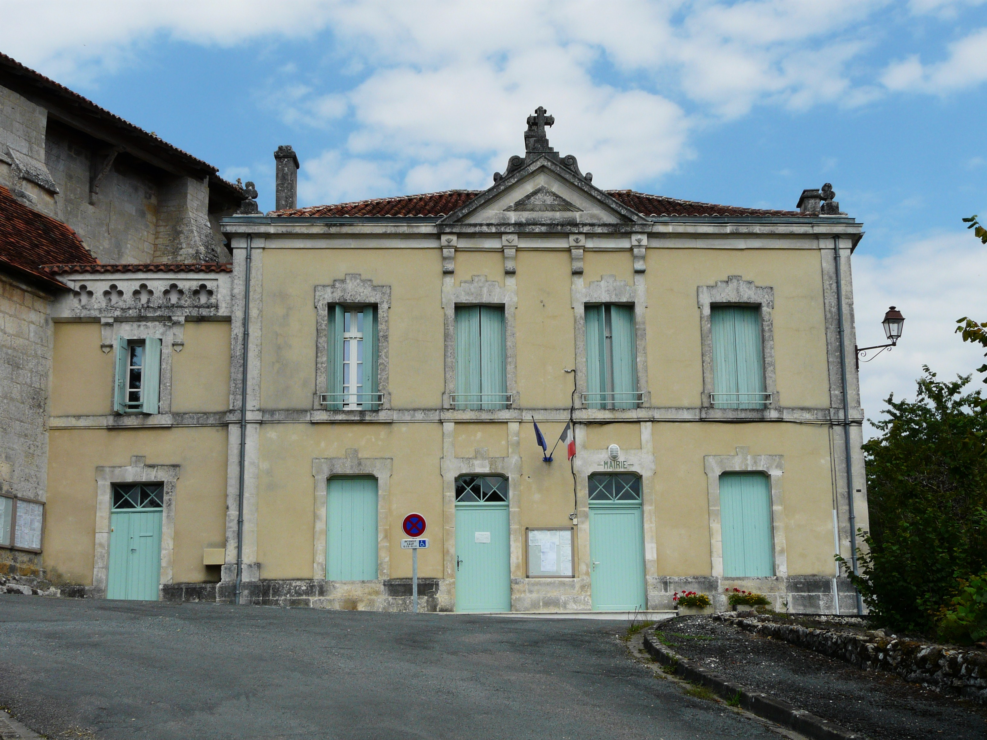 La mairie de Saint-Just, Dordogne, France.